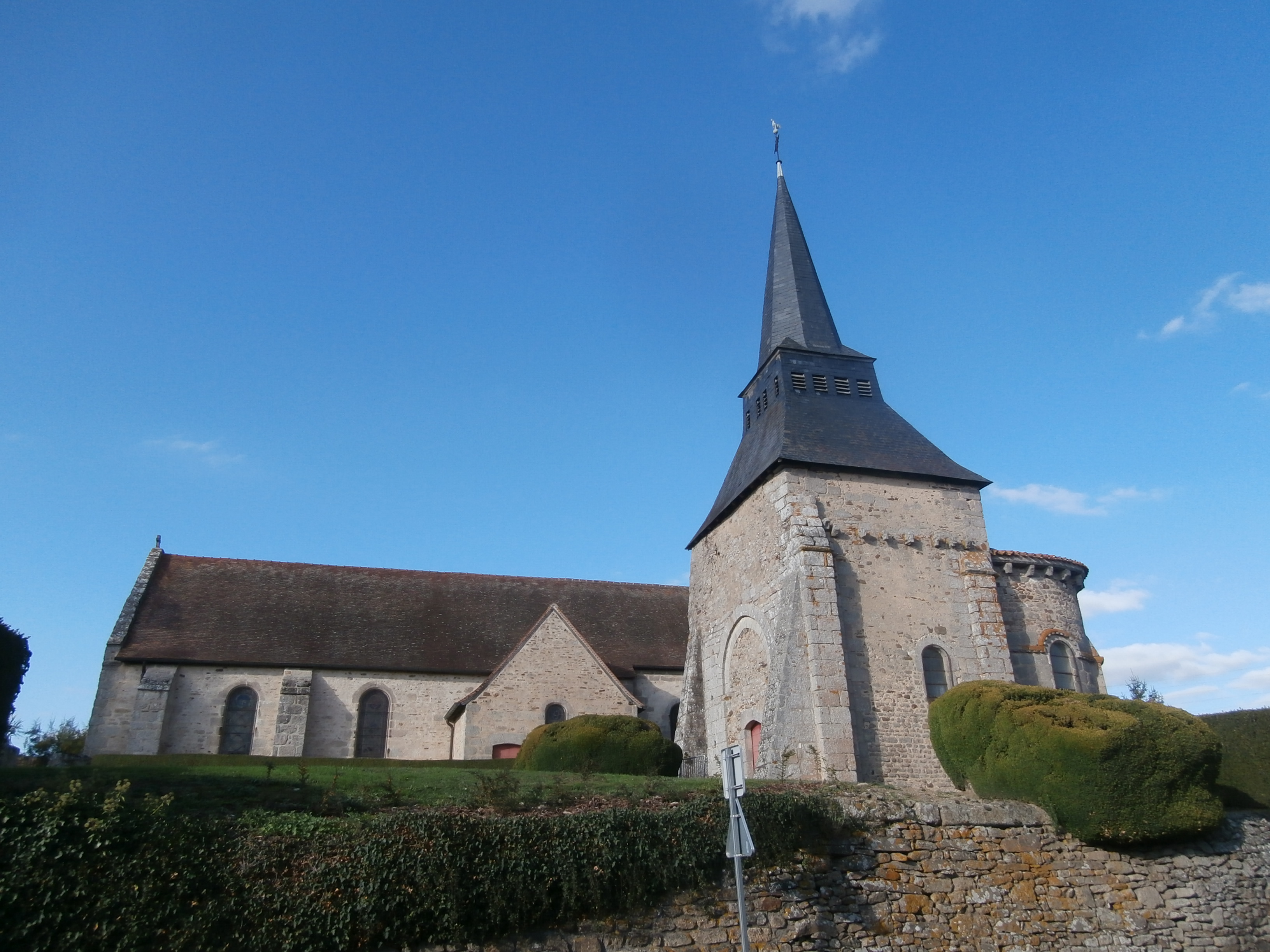 église